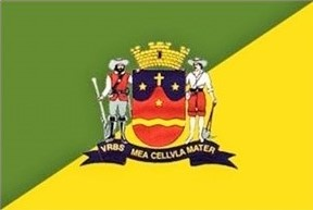 Bandeira do município de Mariana